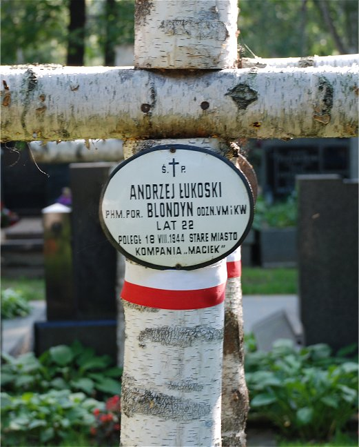 Andrzej Łukoski, Powązki, Warszawa